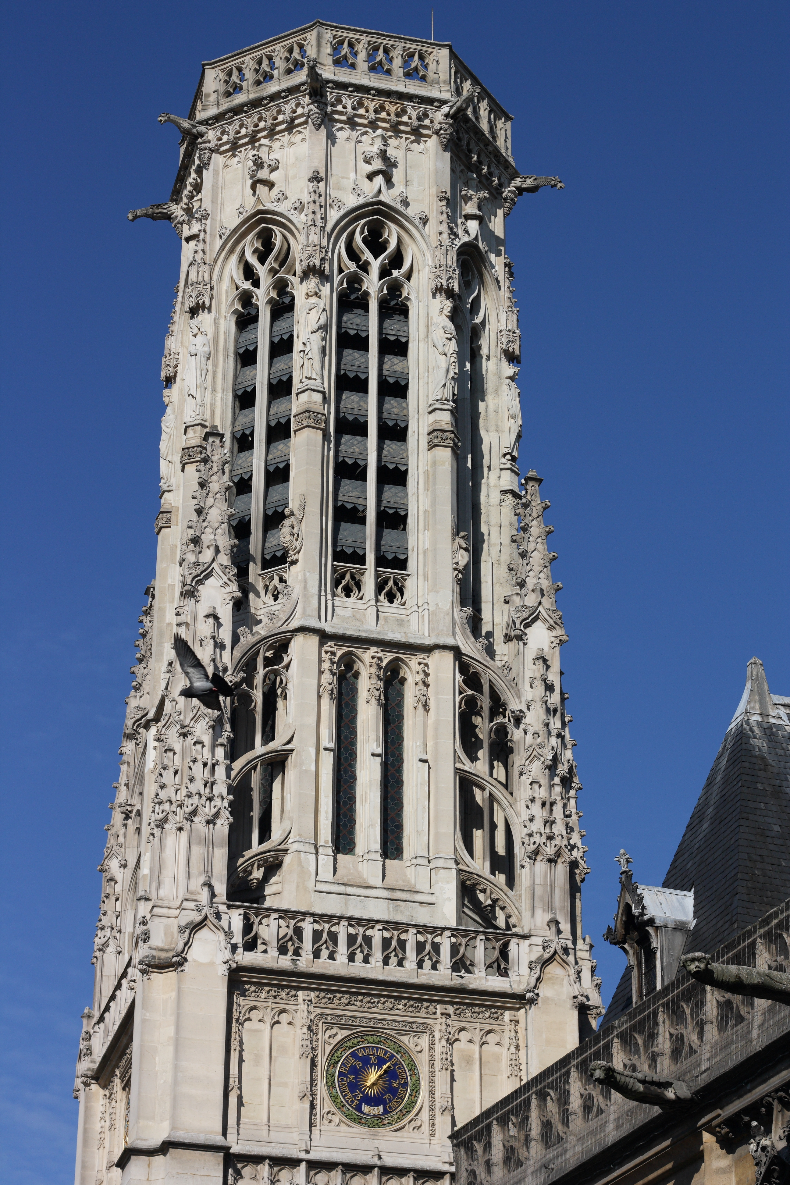 Belfried des Bürgeermeisteramtes des 1. Arrondissements, Paris, Frankreich.